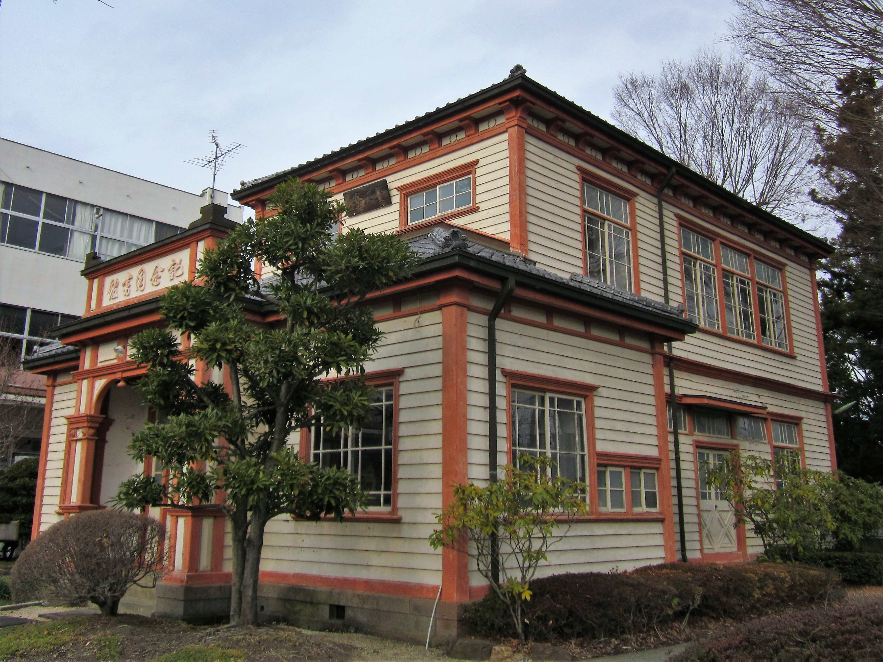 栃木高校記念図書館 Canon PowerShot A2200